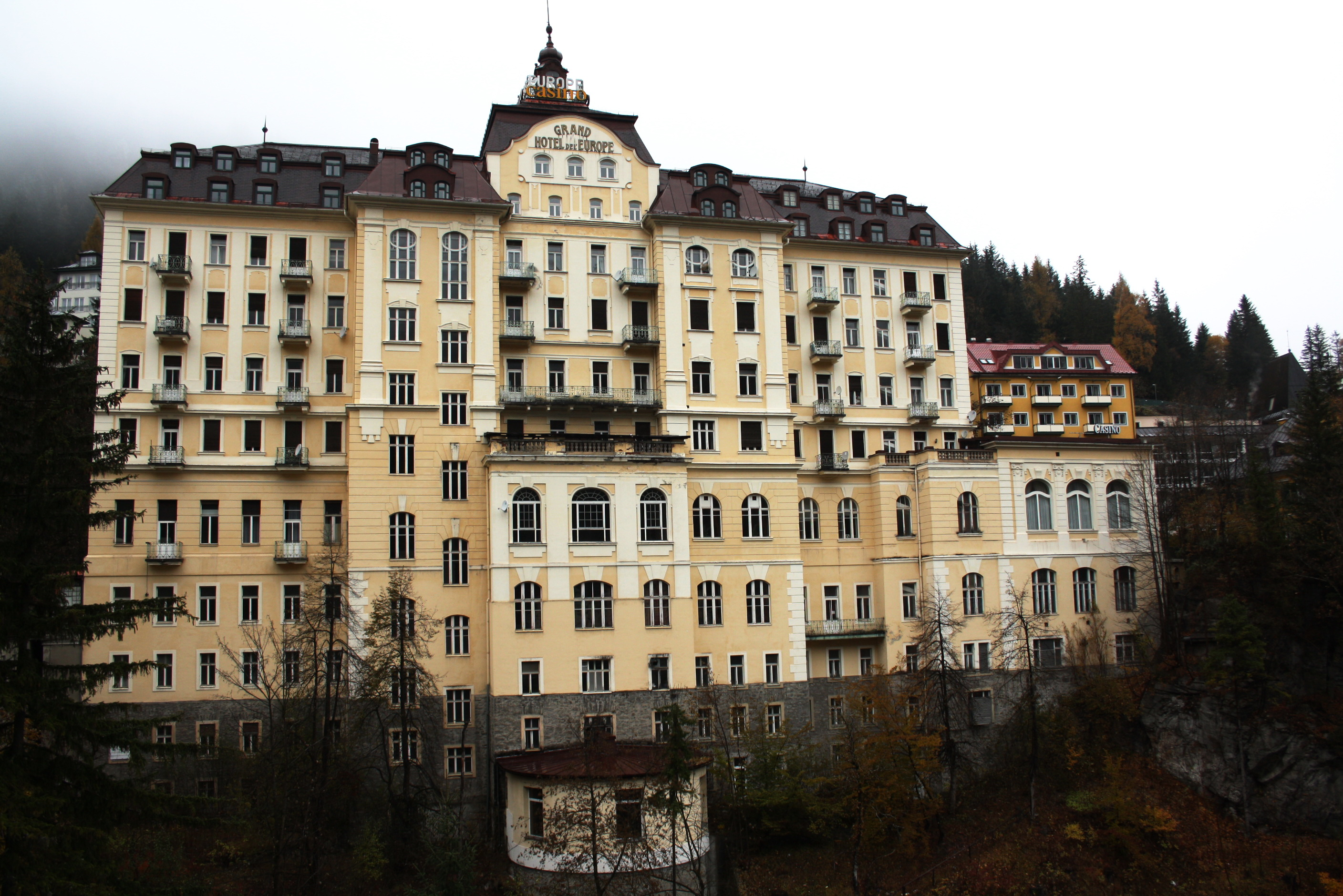 Grand Hotel de l'Europe in Bad Gastein in Österreich.